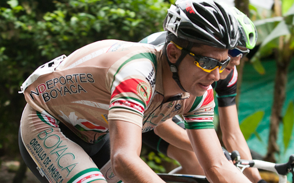 Edgar Fonseca, ciclista del equipo colombiano Boyacá Orgullo de América en la Vuelta a Antioquia 2011